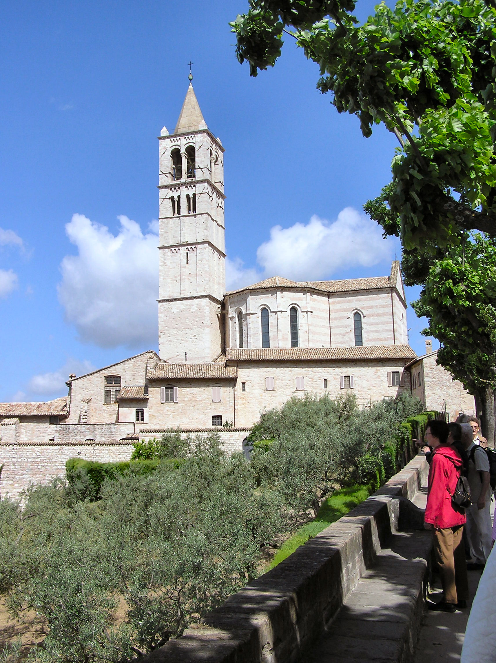 Assisi, Basilica di Santa Chiara